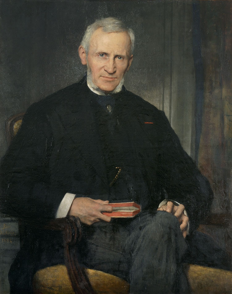 Portrait de Régnier, de la Comédie Française 1884 Huile sur toile 92 x 73,5 cm Inscript. B. G. Elie Delaunay/1884 Don de Mme Régnier, 1894, en souvenir du séjour de l’artiste au Grand Hôtel de Nantes Inv. 919 cteur célèbre, François-Pierre Régnier (1807-1885) est ici peint posant dans un fauteuil, la main gardant une page de livre, l’air encore plongé dans sa lecture. Sa Légion d’Honneur, bien visible sur le costume sombre, égaye ce portrait sévère, où le fond est délicatement nuancé par la lumière qui glisse de gauche à droite. Dans l’un des deux portraits qu’il réalisa de cet homme célèbre, Delaunay traduit l’honnêteté et la droiture d’un homme, dont la carrière d’acteur culmina par la direction du Théâtre Français. Le portrait fut très apprécié par la critique lors de sa présentation au Salon de 1884 (n° 710).